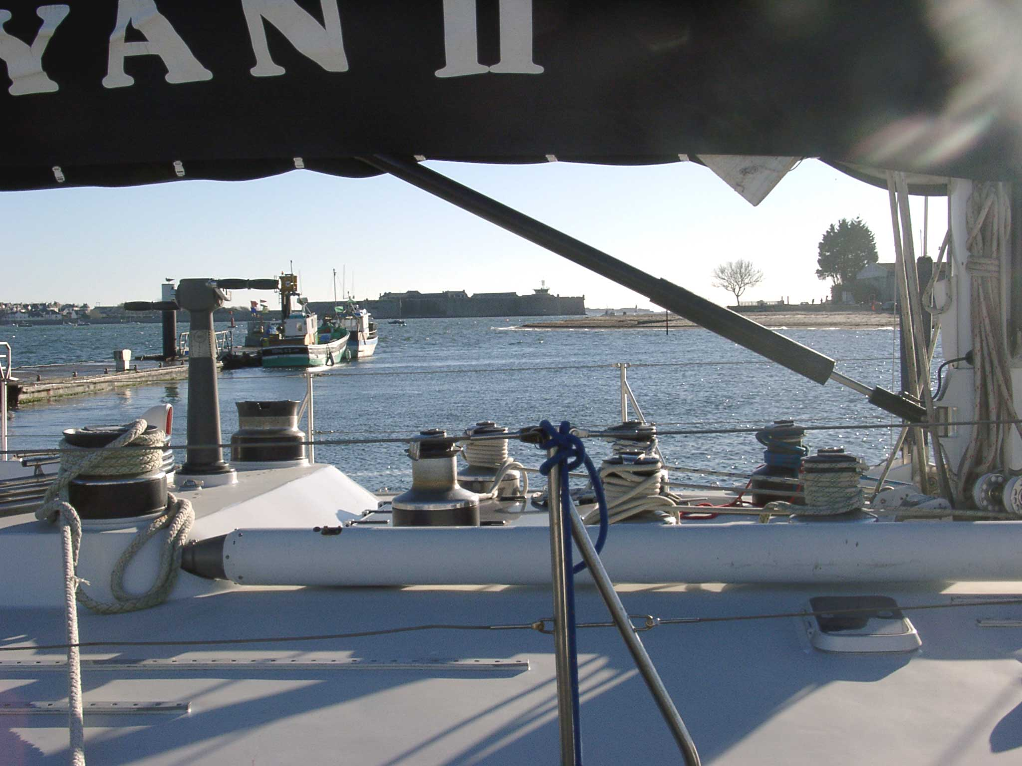 Description : winch à colonne sur un voilier à Lorient (port de Kernevel) Lieu : Lorient, France Date : 2003 Author : Pline photo ou réalisation (schéma) personnelle